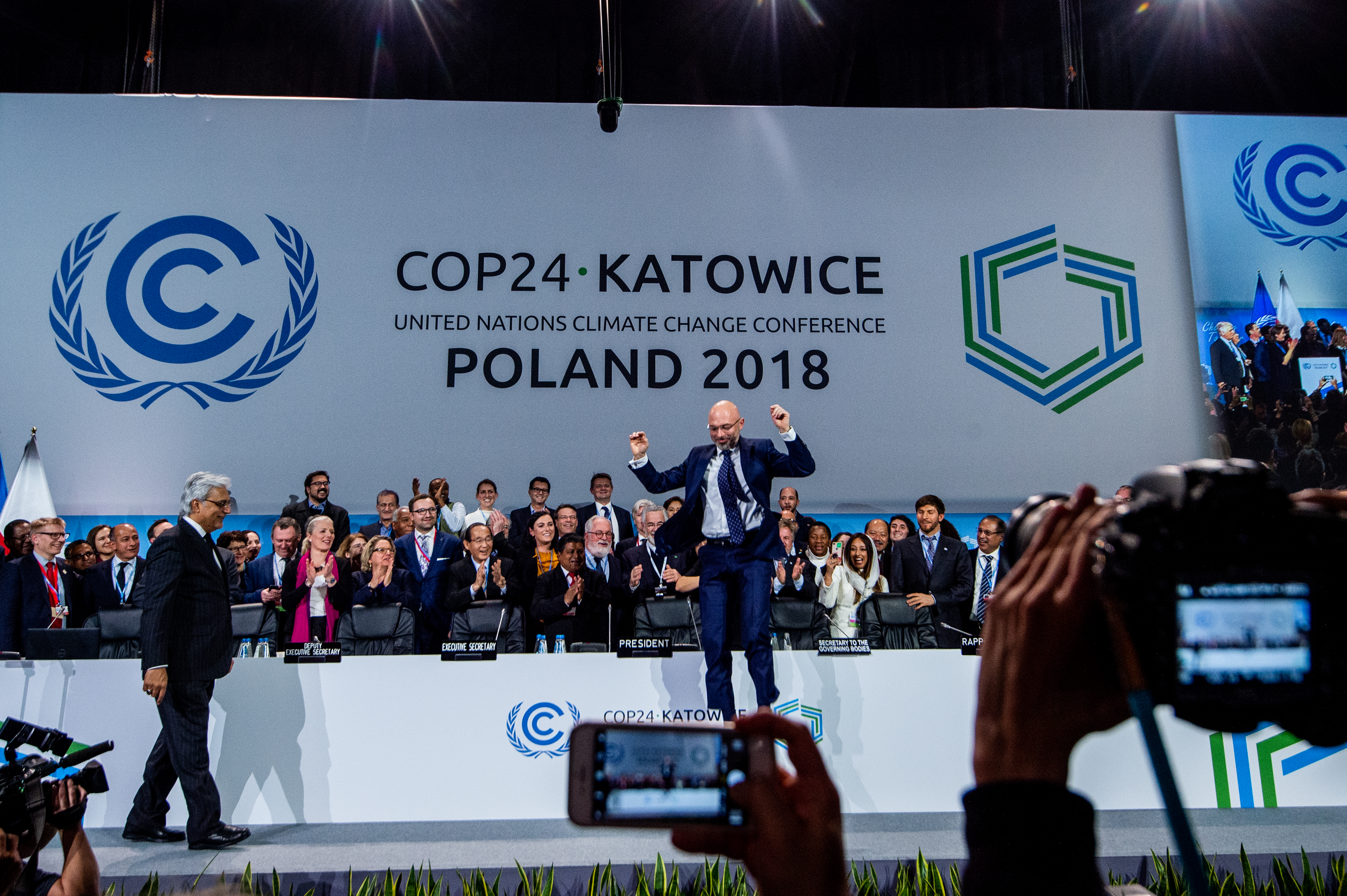 Przedstawiciele Stron cieszą się po przyjęciu dokumentu Katowice Rulebook